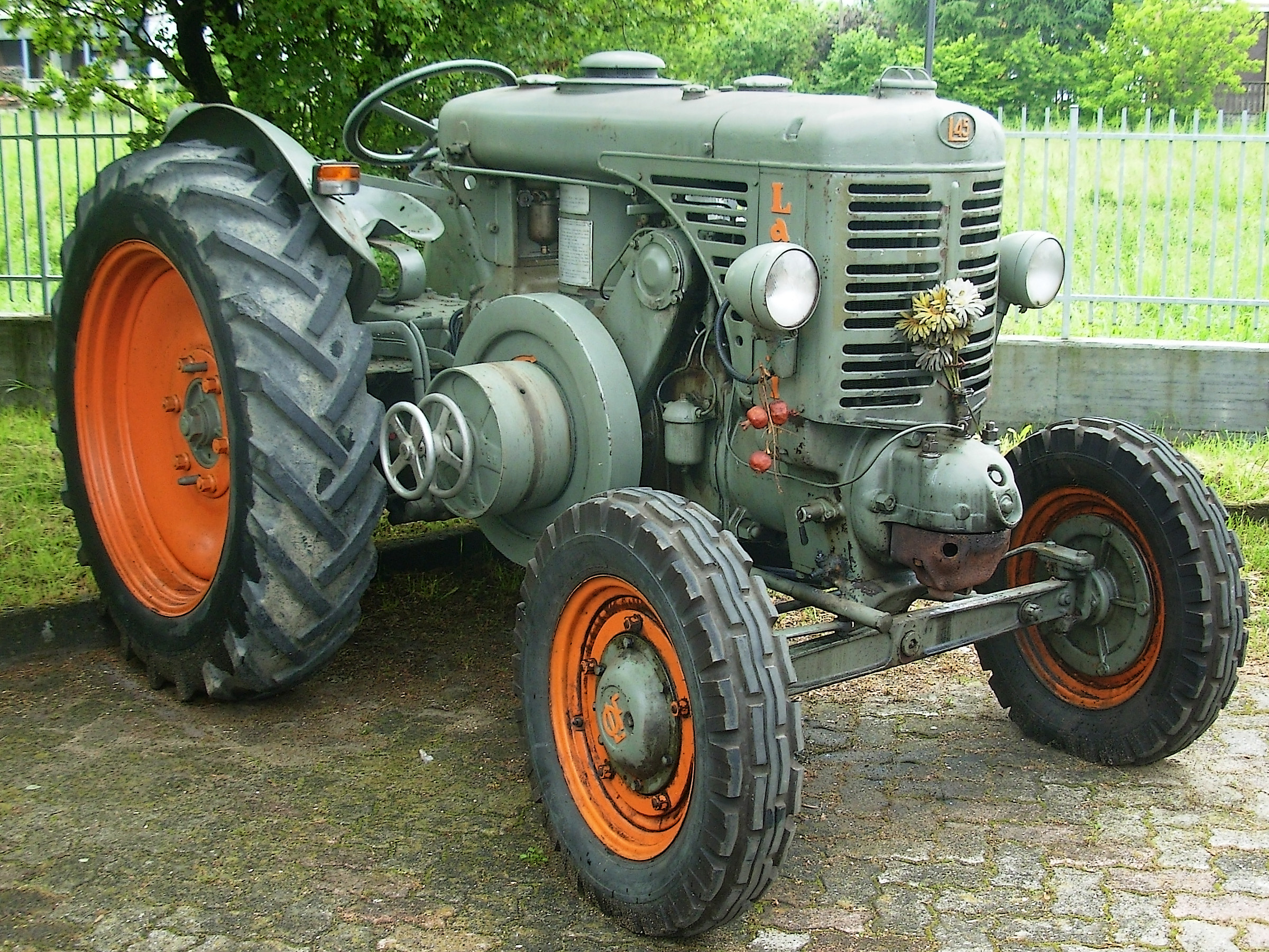 Trattore Landini L45 testacalda